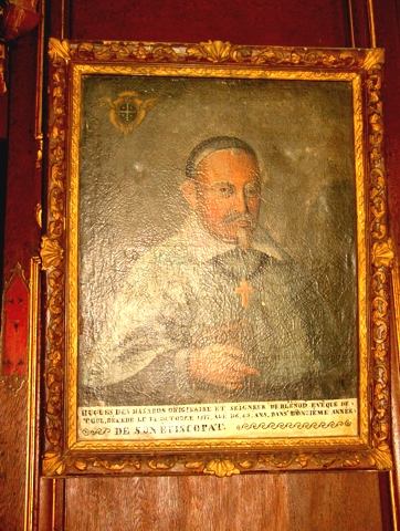 Portrait de Hugues des Hazards §Licensing (© Francis MONTIGNON) GFDL